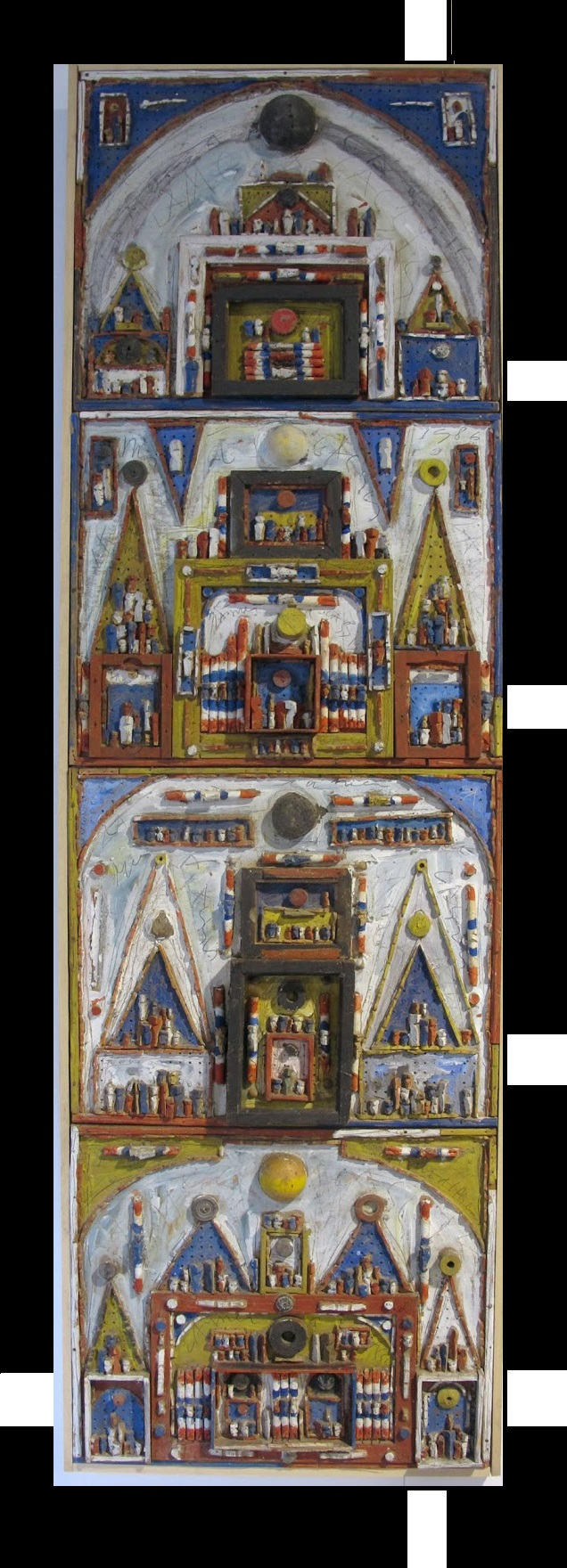 Montage photo fait sur la base d'une photo prise de Mer à Cassis d'Armand Avril de 1986